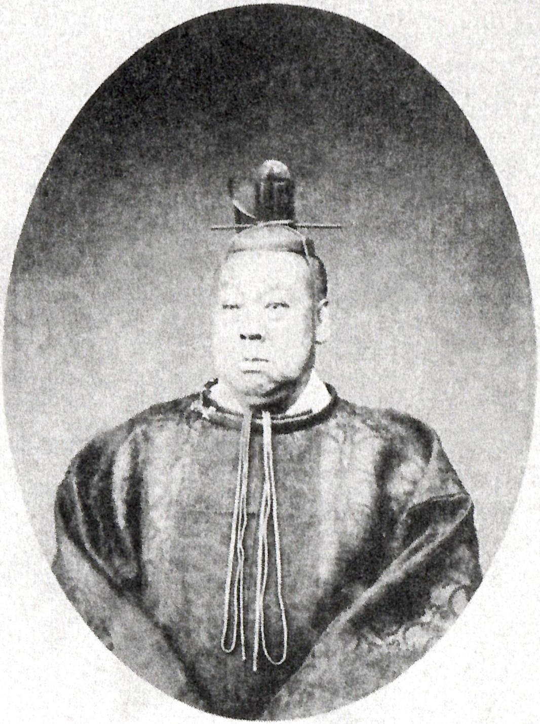 宗義和の肖像写真。